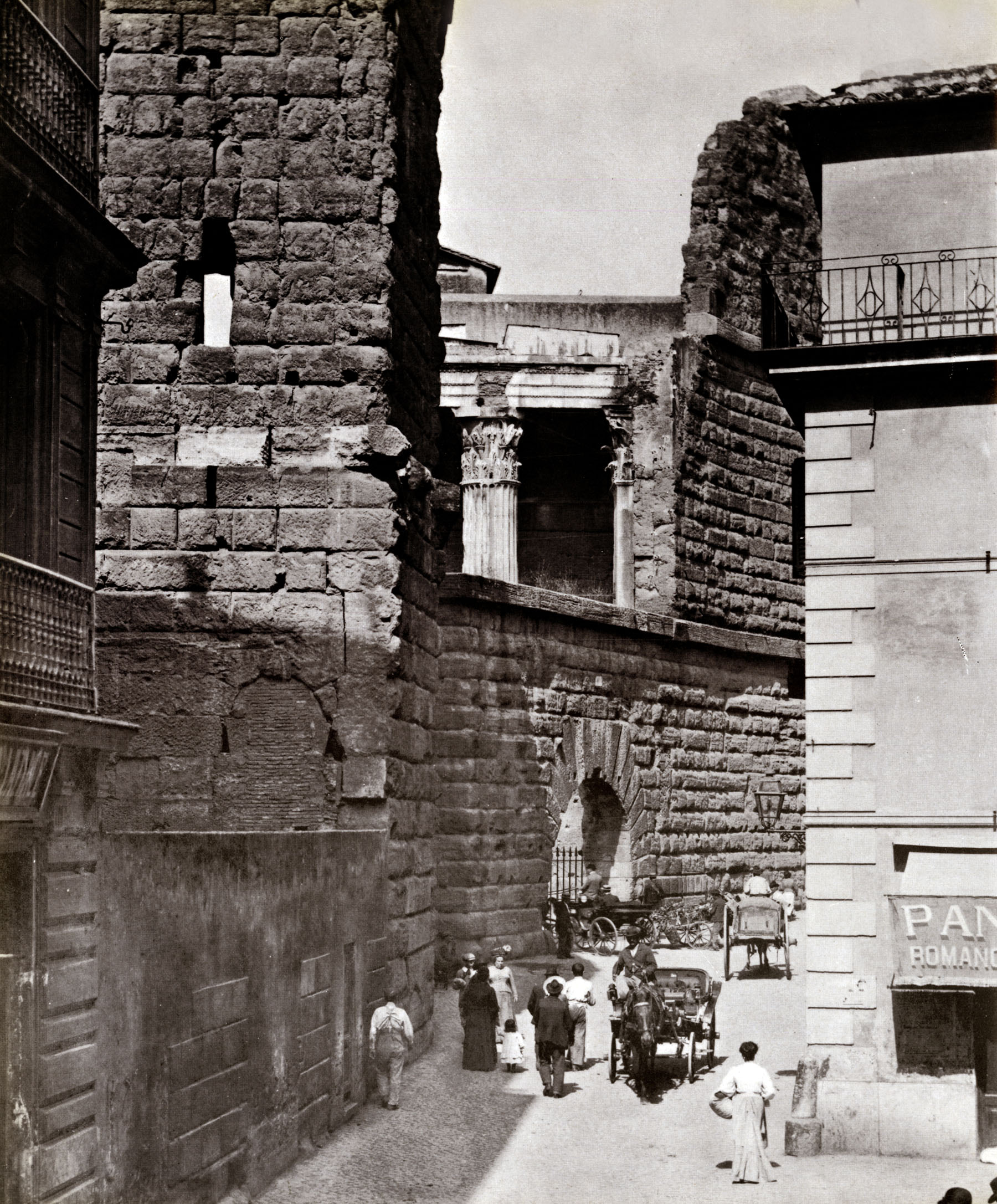 Roma, via Tor de' Conti e muro della Suburra nel 1880